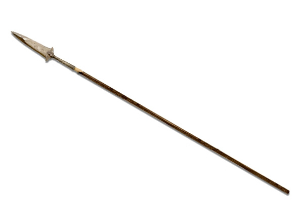 Lanza partesana